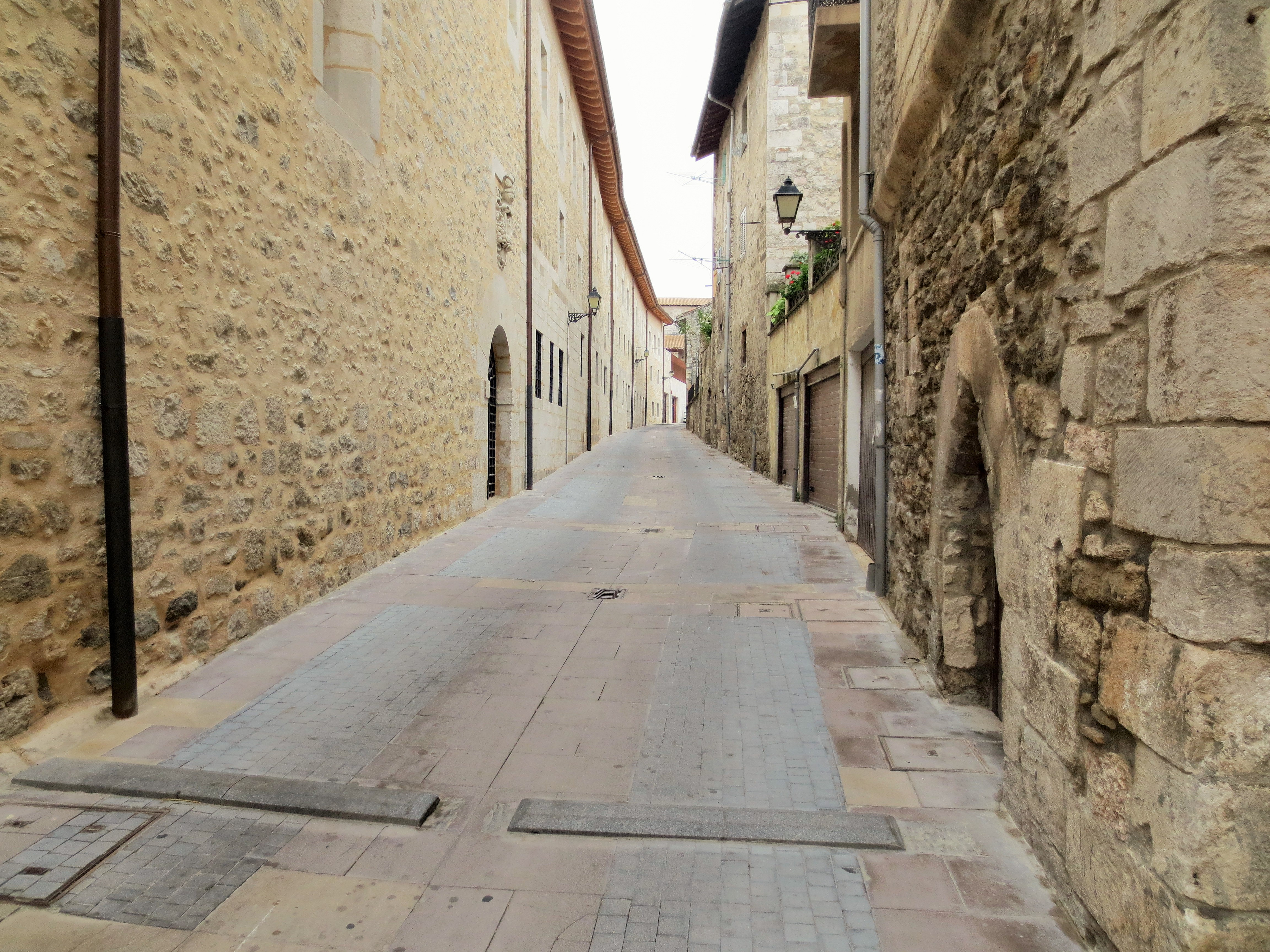 Alde Zaharra